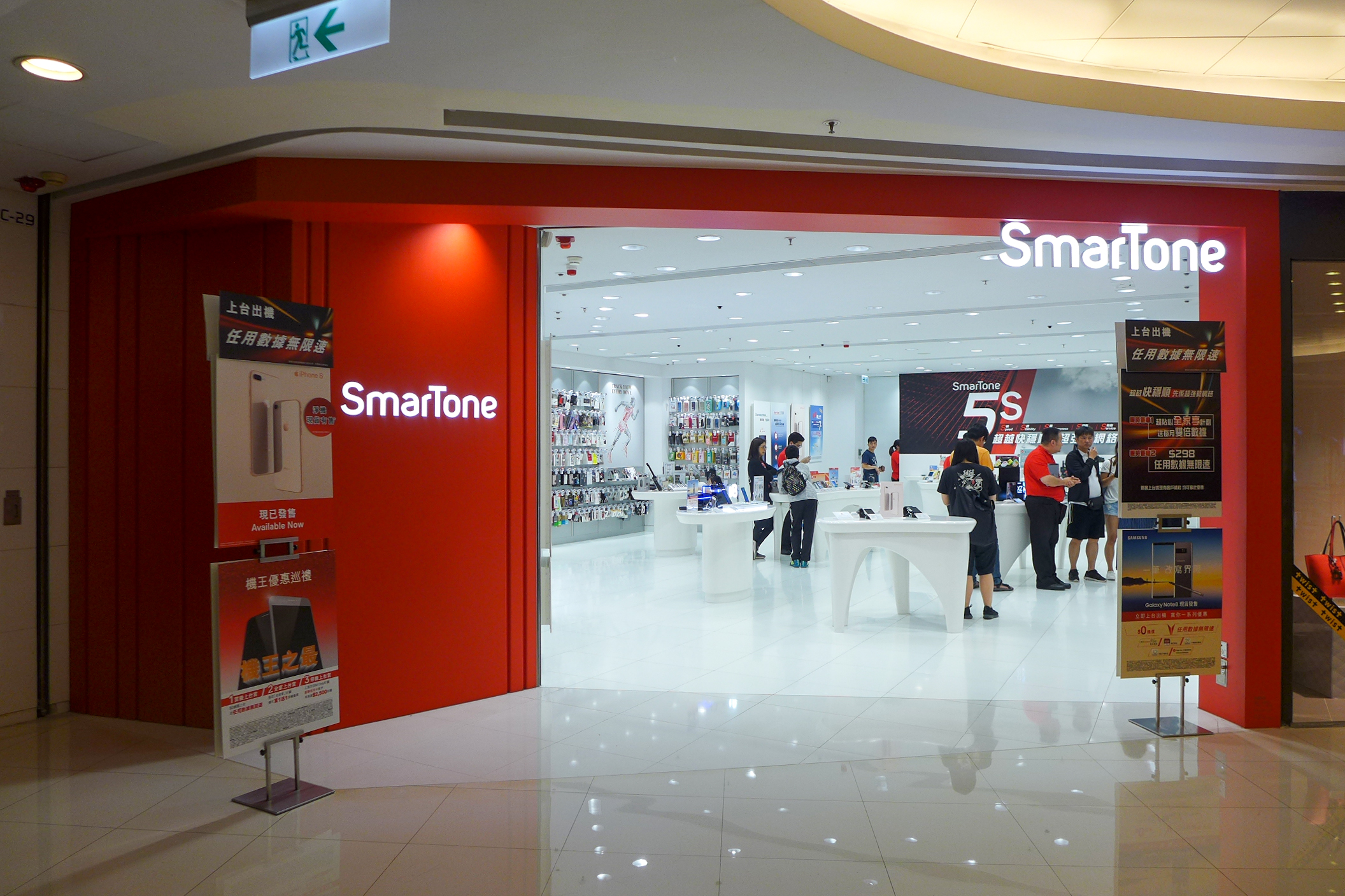 Smartone in apm